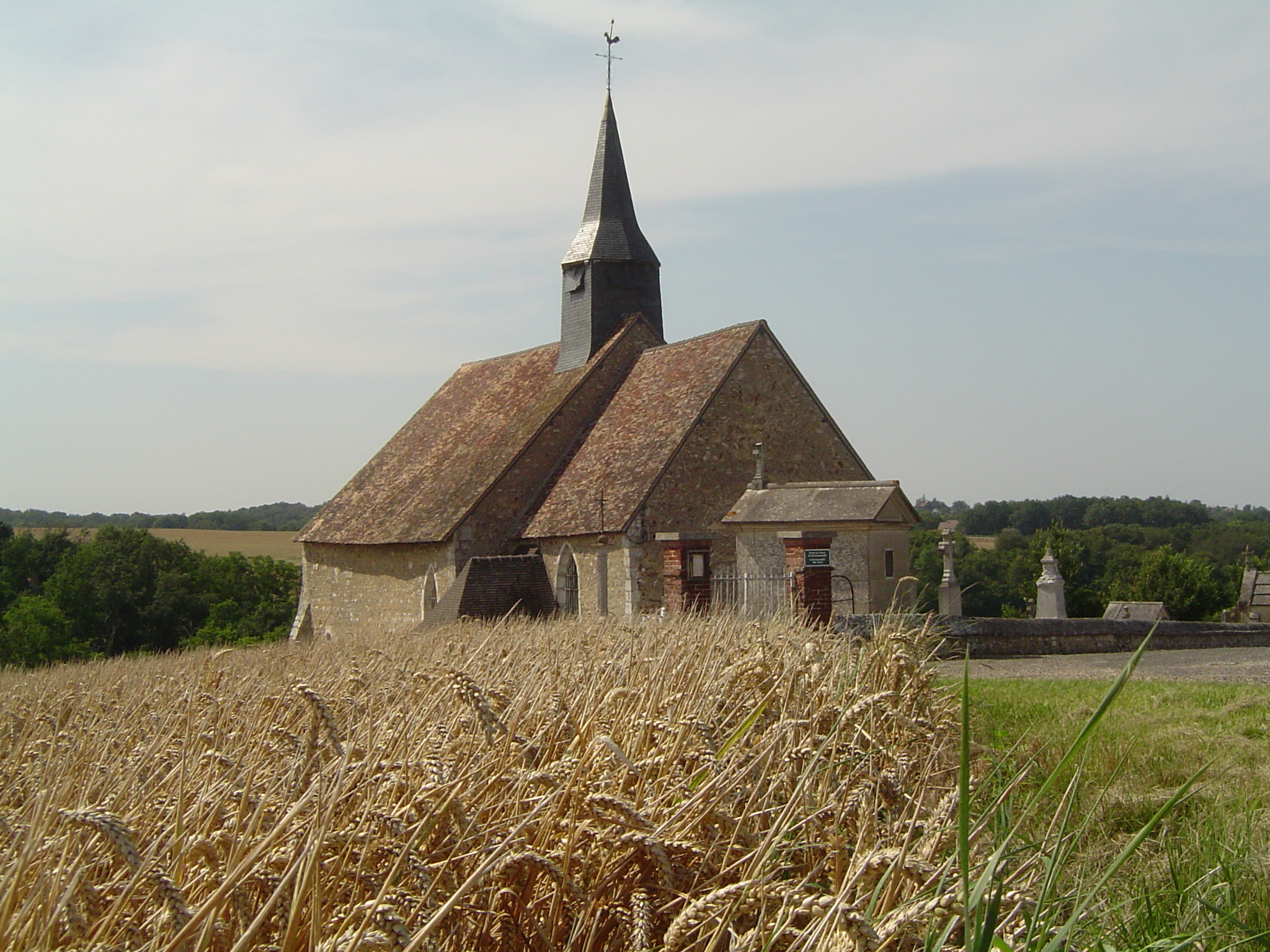 Eglise Saint-Christophe de Reuilly